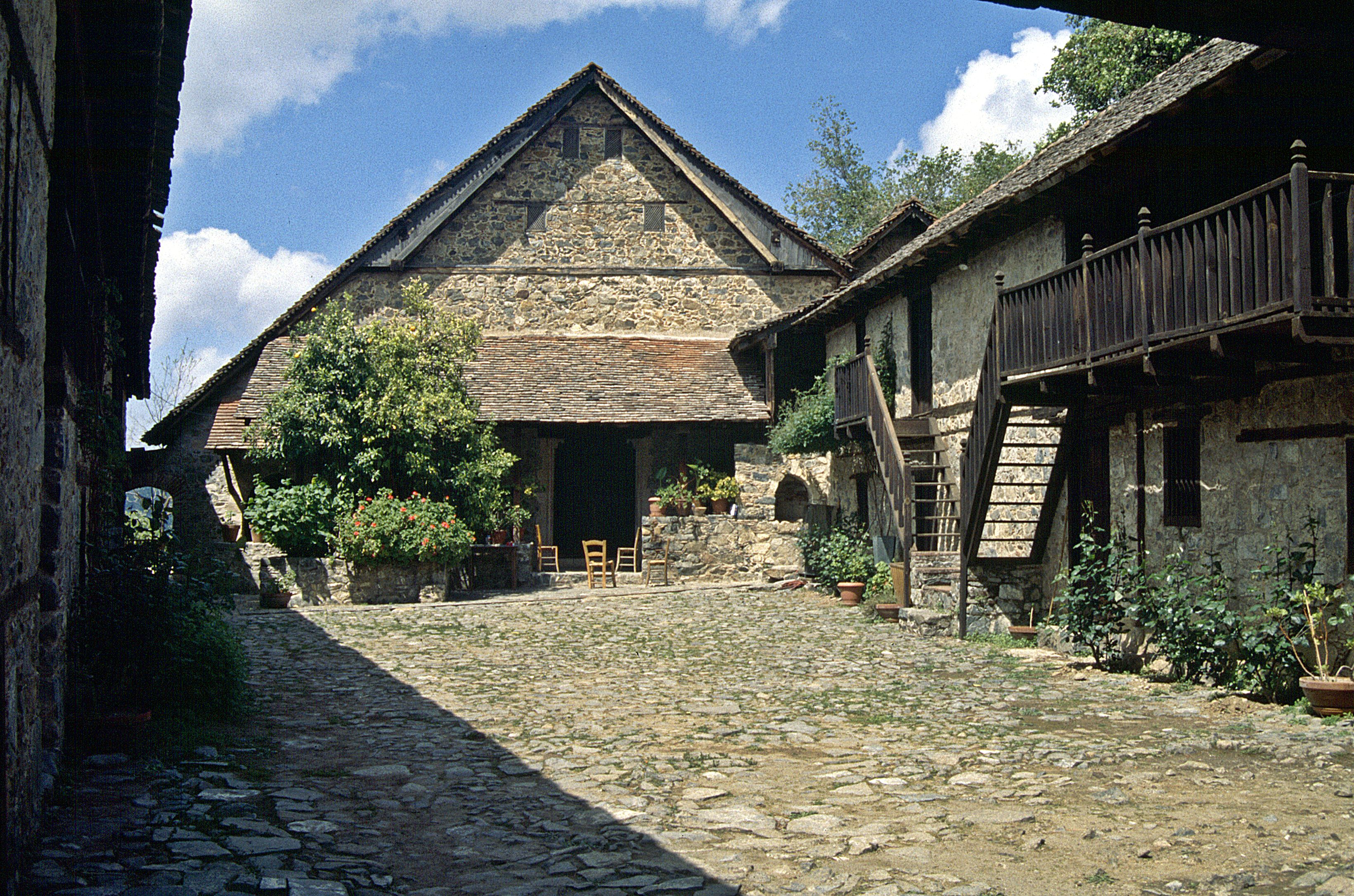 Kalopanayiotis: Kloster Agios Ioannis Lambadistis